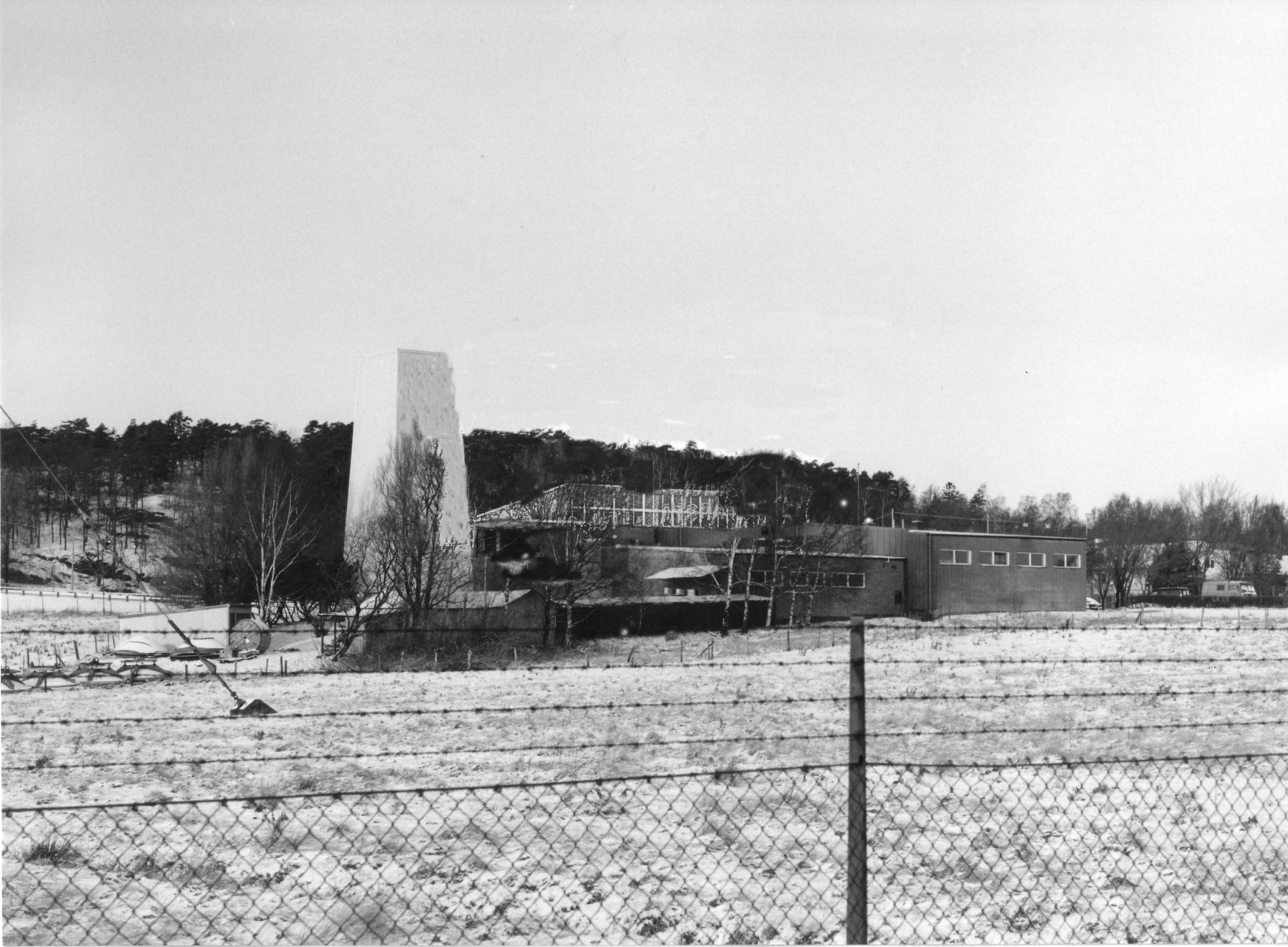 Kyltorn och stationsbyggnad vid mellanvågsstationen i Göteborg.